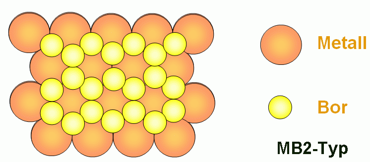 Die Boridstruktur beim Typ MB2